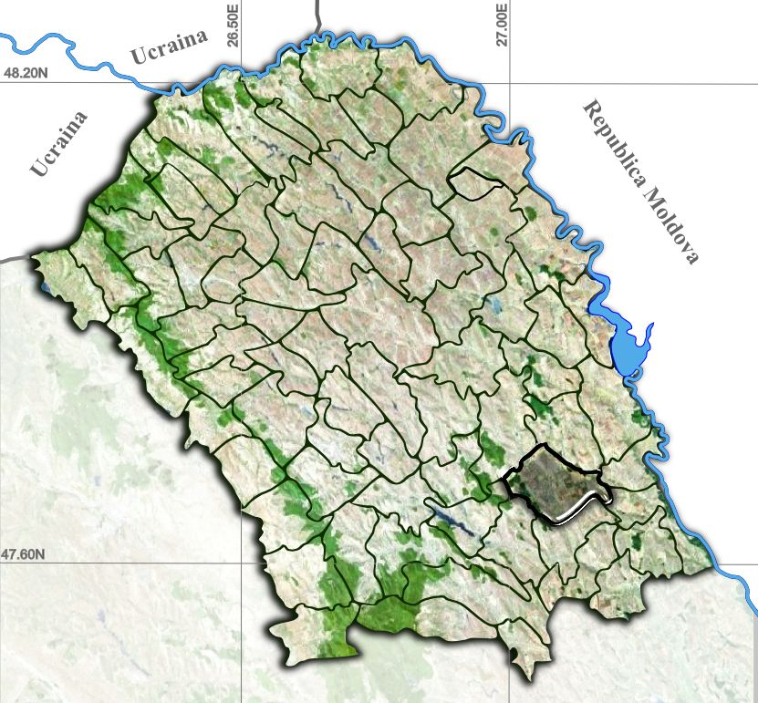 Albesti jud Botosani.